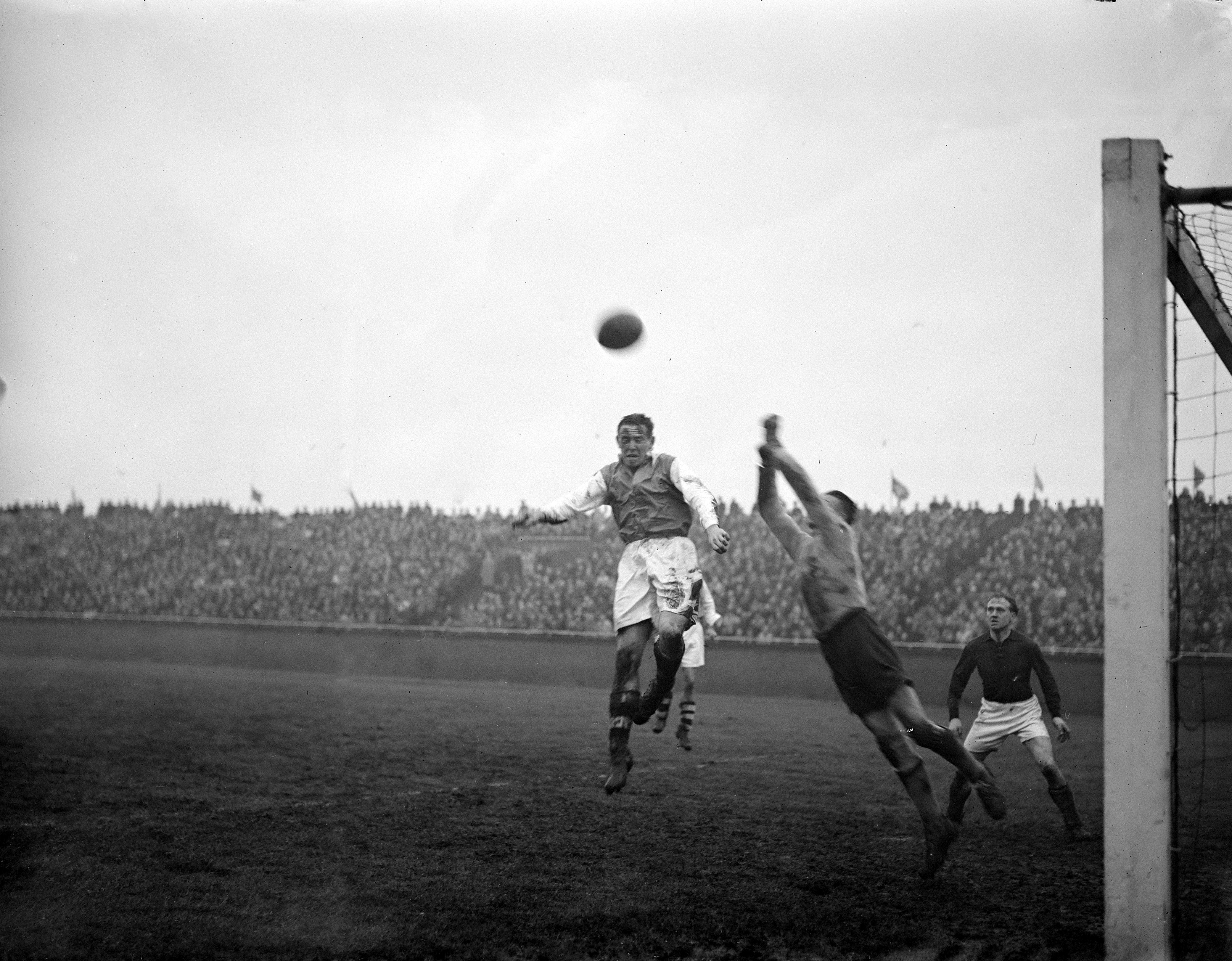 Collectie / Archief : Fotocollectie Anefo Reportage / Serie : [ onbekend ] Beschrijving : Ajax tegen VSV Datum : 29 december 1946 Persoonsnaam : Vsv Instellingsnaam : AJAX Fotograaf : Vrind, Luuk / Anefo Auteursrechthebbende : Nationaal Archief Materiaalsoort : Glasnegatief Nummer archiefinventaris : bekijk toegang 2.24.01.09 Bestanddeelnummer : 901-9784